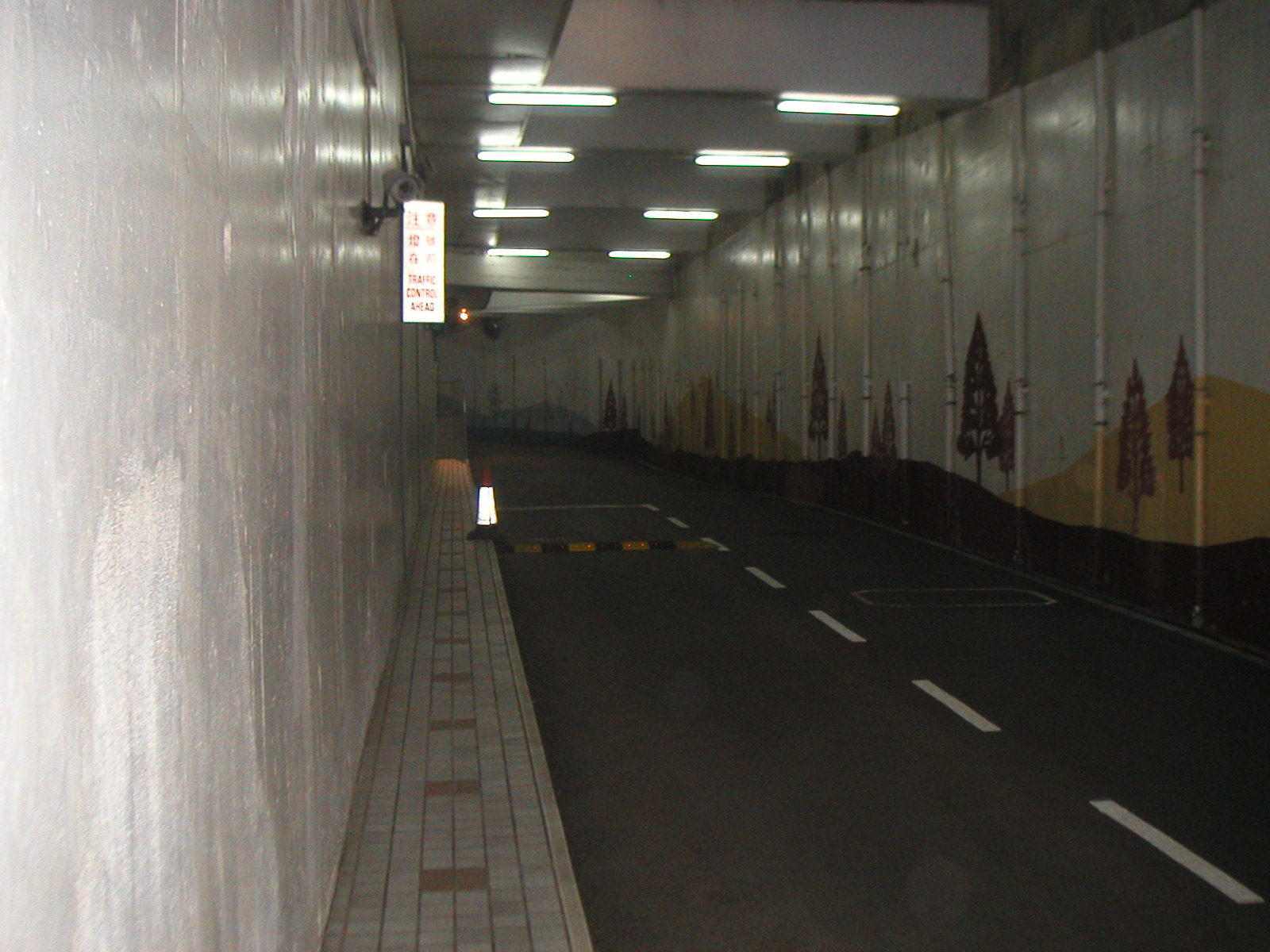 龍園的停車場出入口 粵語: 龍園嘅停車場出入口